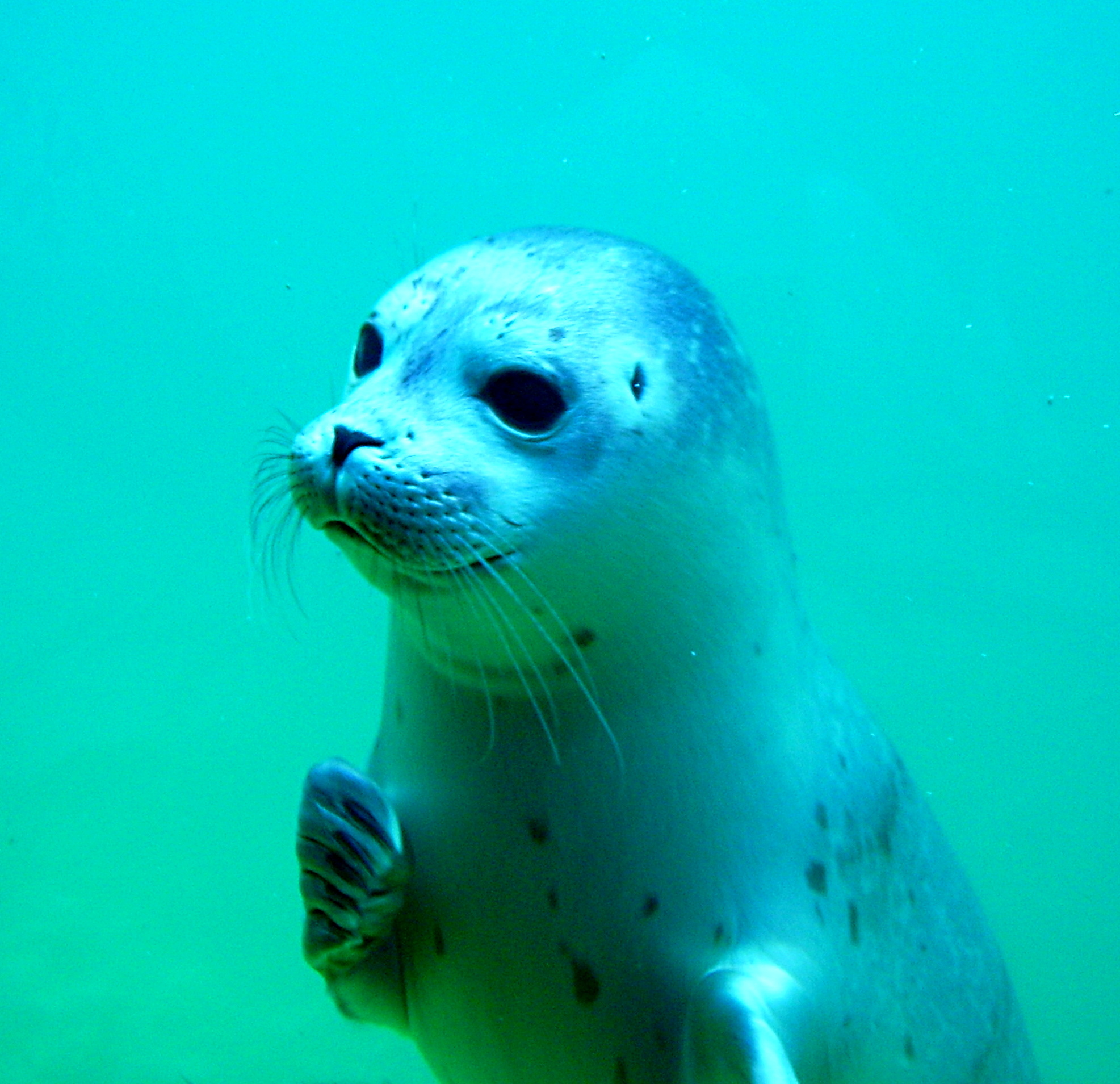 Foca a Alemanya.